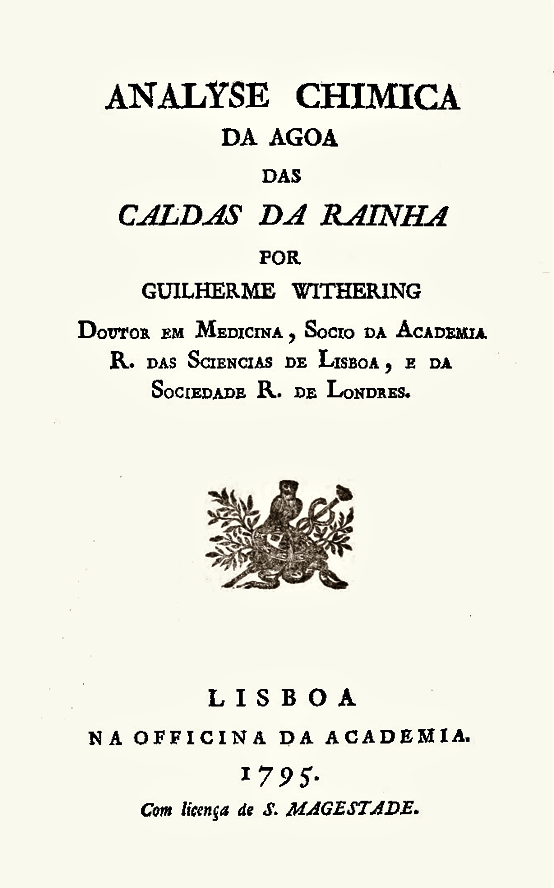 William Withering - Analyse chimica da agoa das Caldas da Rainha, 1795, Titelseite